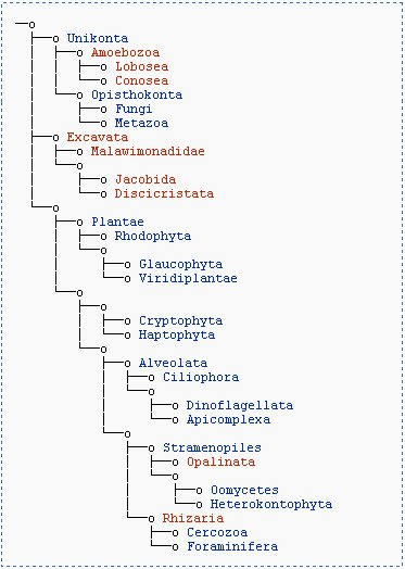 Eukaryota_(Arbre_d'après_Burki_et_al)